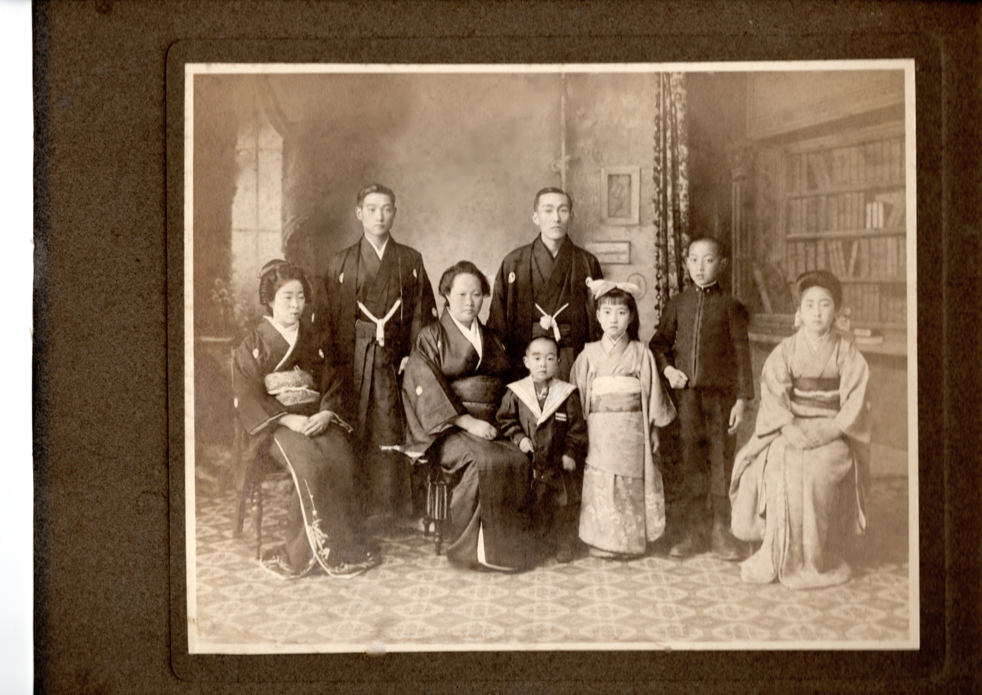 合名会社独立画像１